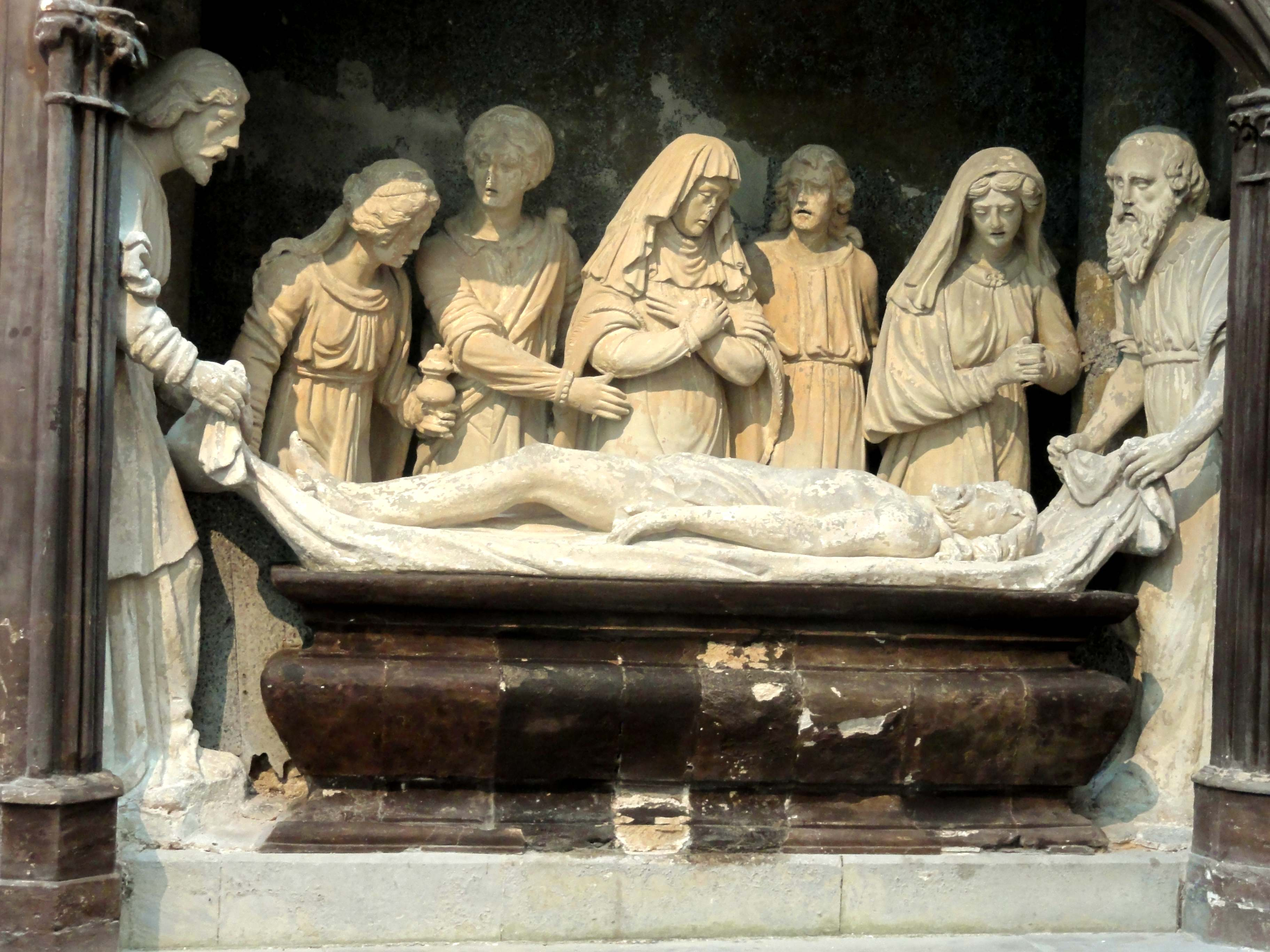 Le Saint-Sépulcre ou la Mise au Tombeau de la fin du XVIe ou du début du XVIIe siècle.